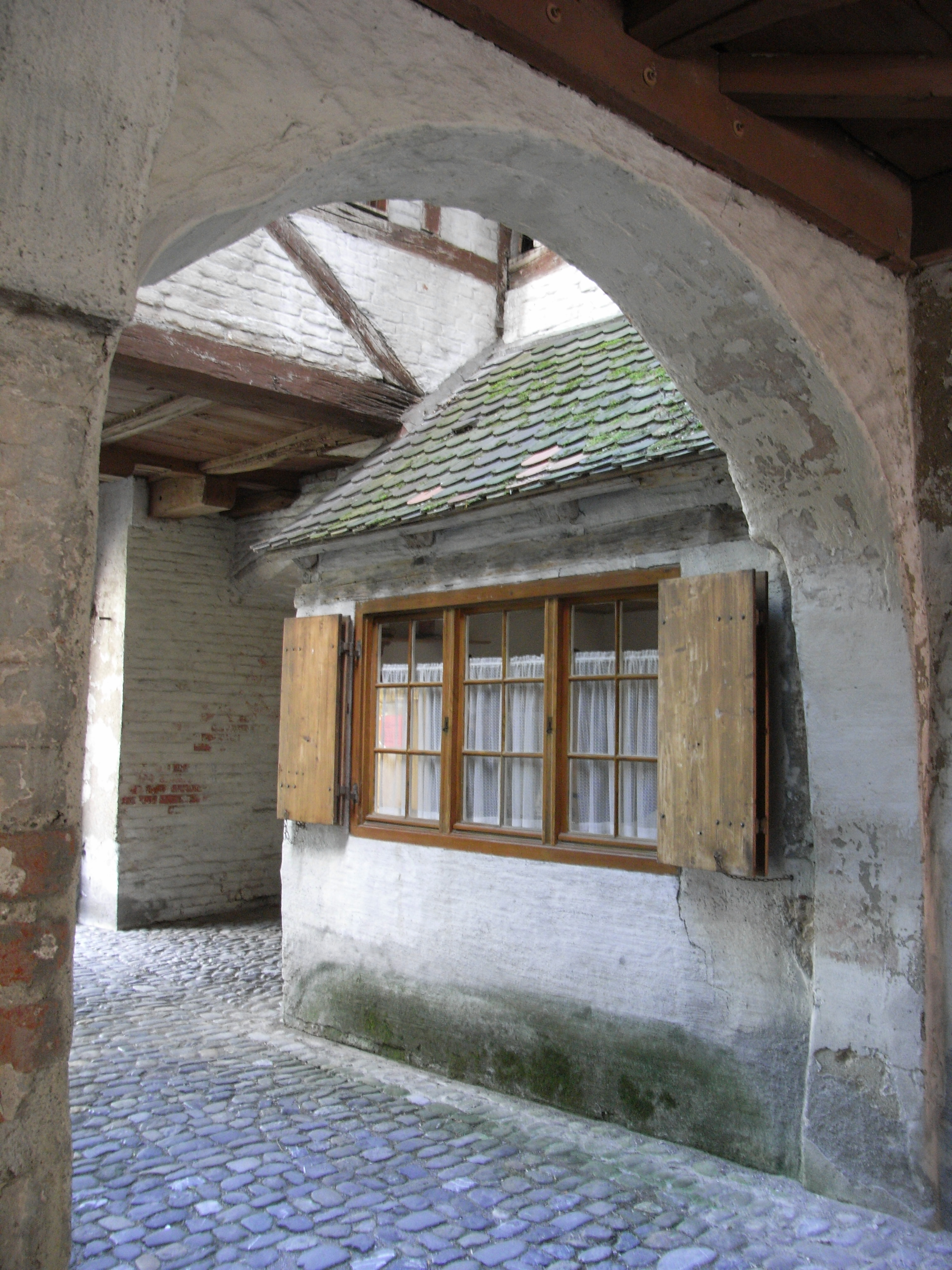 Wächterhäußchen im Einlaß